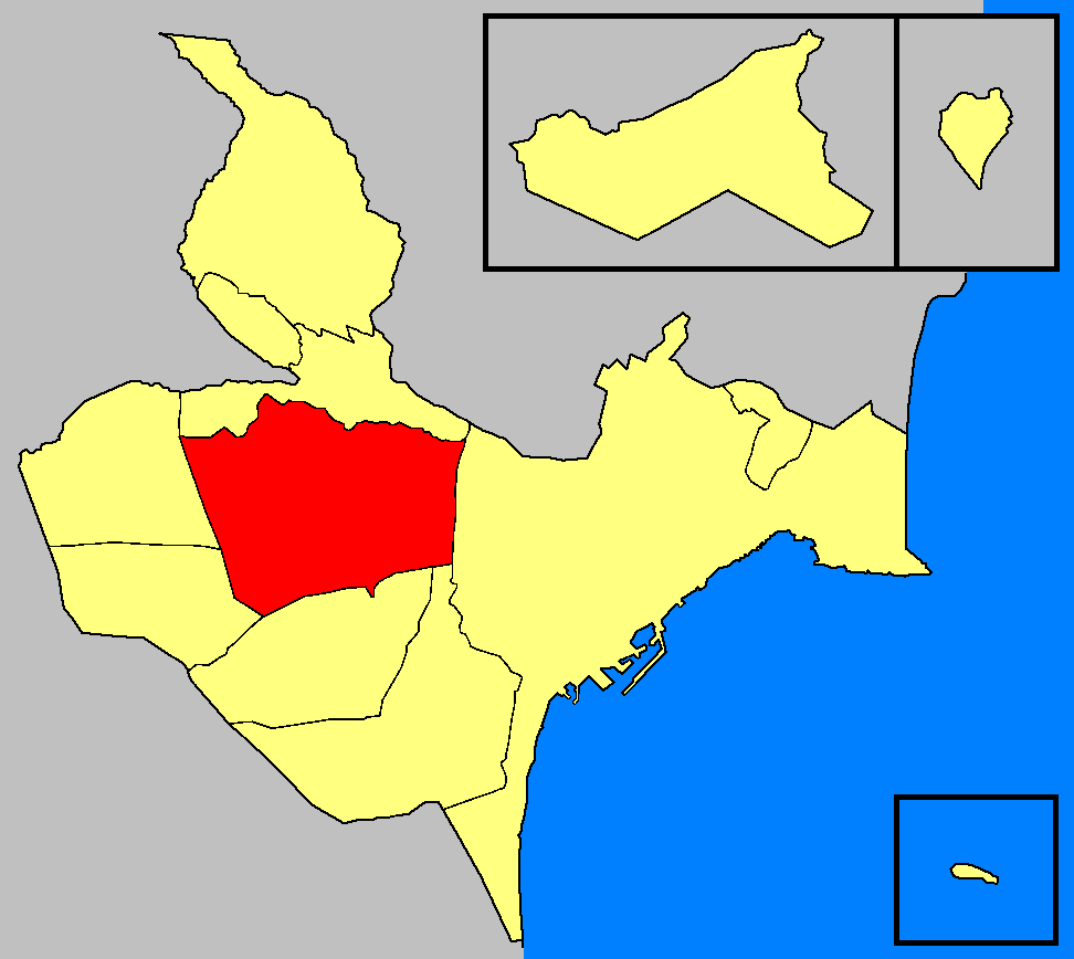 Entidades de población del término municipal de Alicante